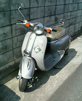 ホンダ・ジョルノ